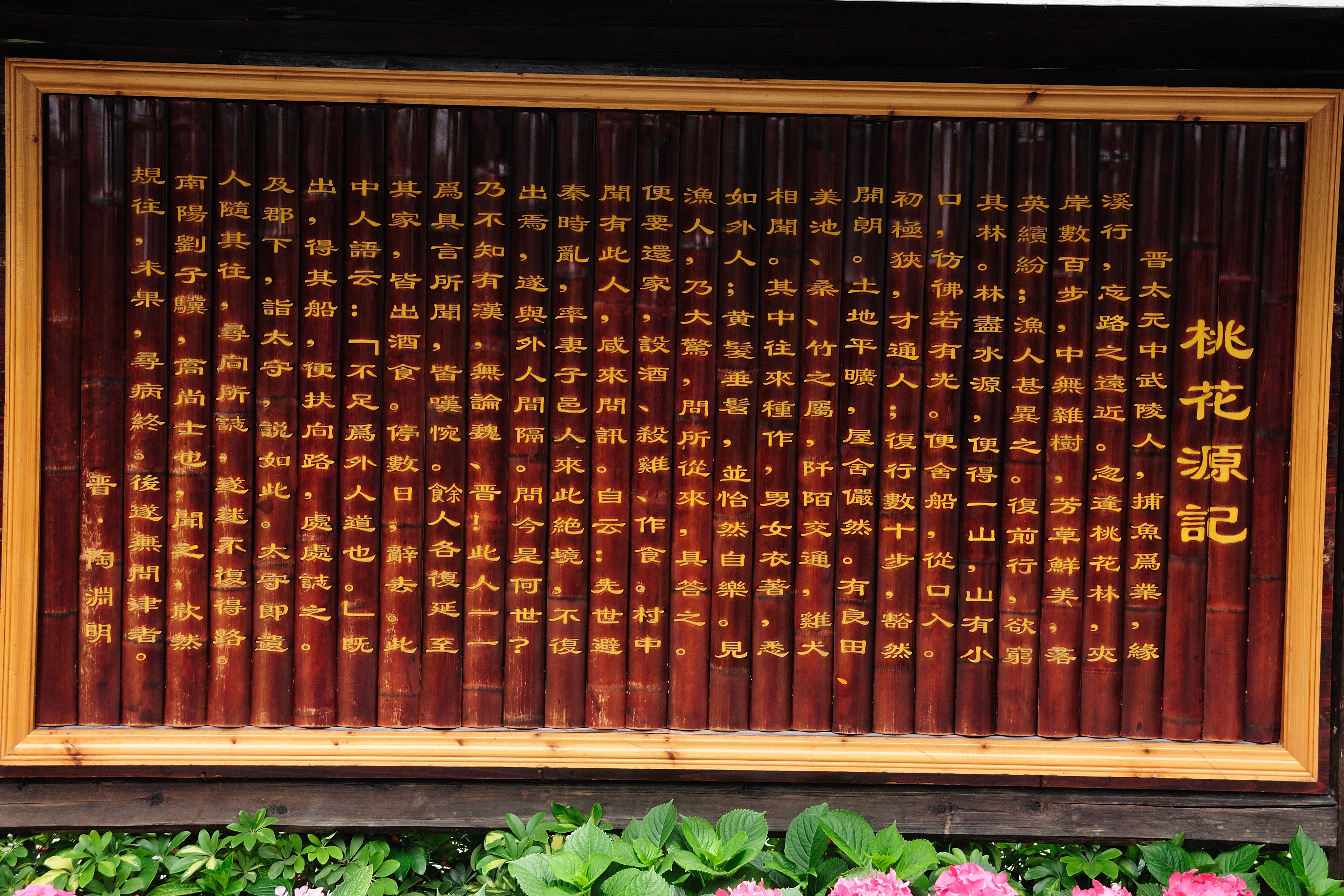 中文（中国大陆）: 桃花源記